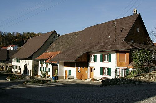 Häuserzeile in Seewen (SO)